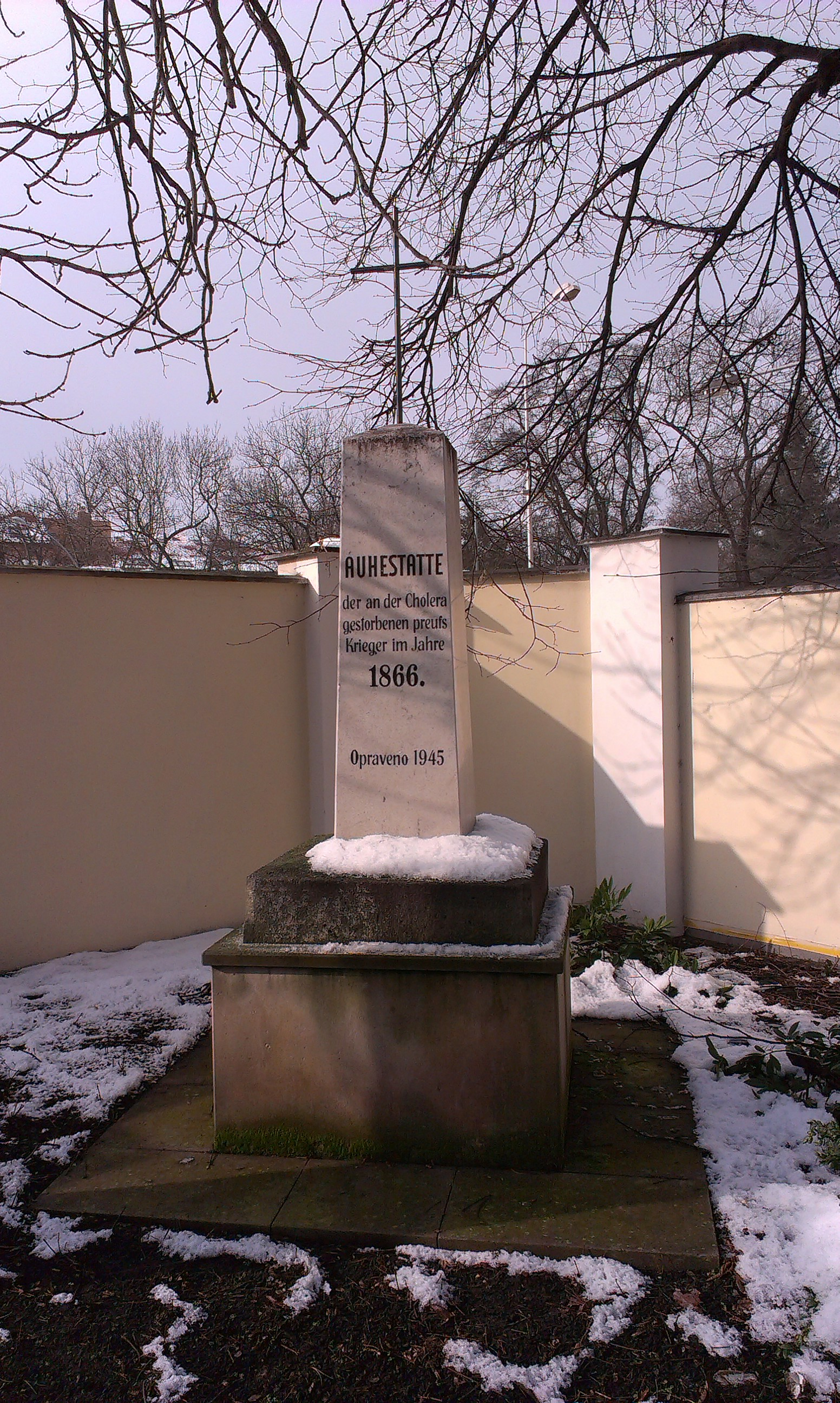 Památce zemřelým v boji proti choleře v roce 1866, bývalý cholerový hřbitov v Kroměříži